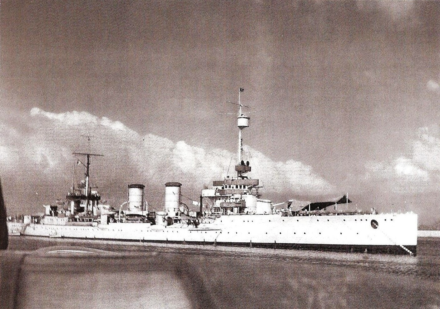 L’incrociatore leggero Bari ormeggiato a Patrasso.